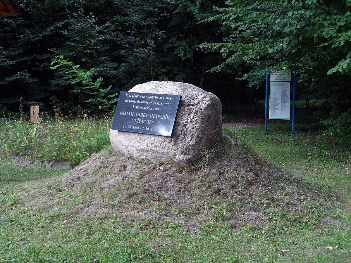 Парэчча. Камень Скірмунту